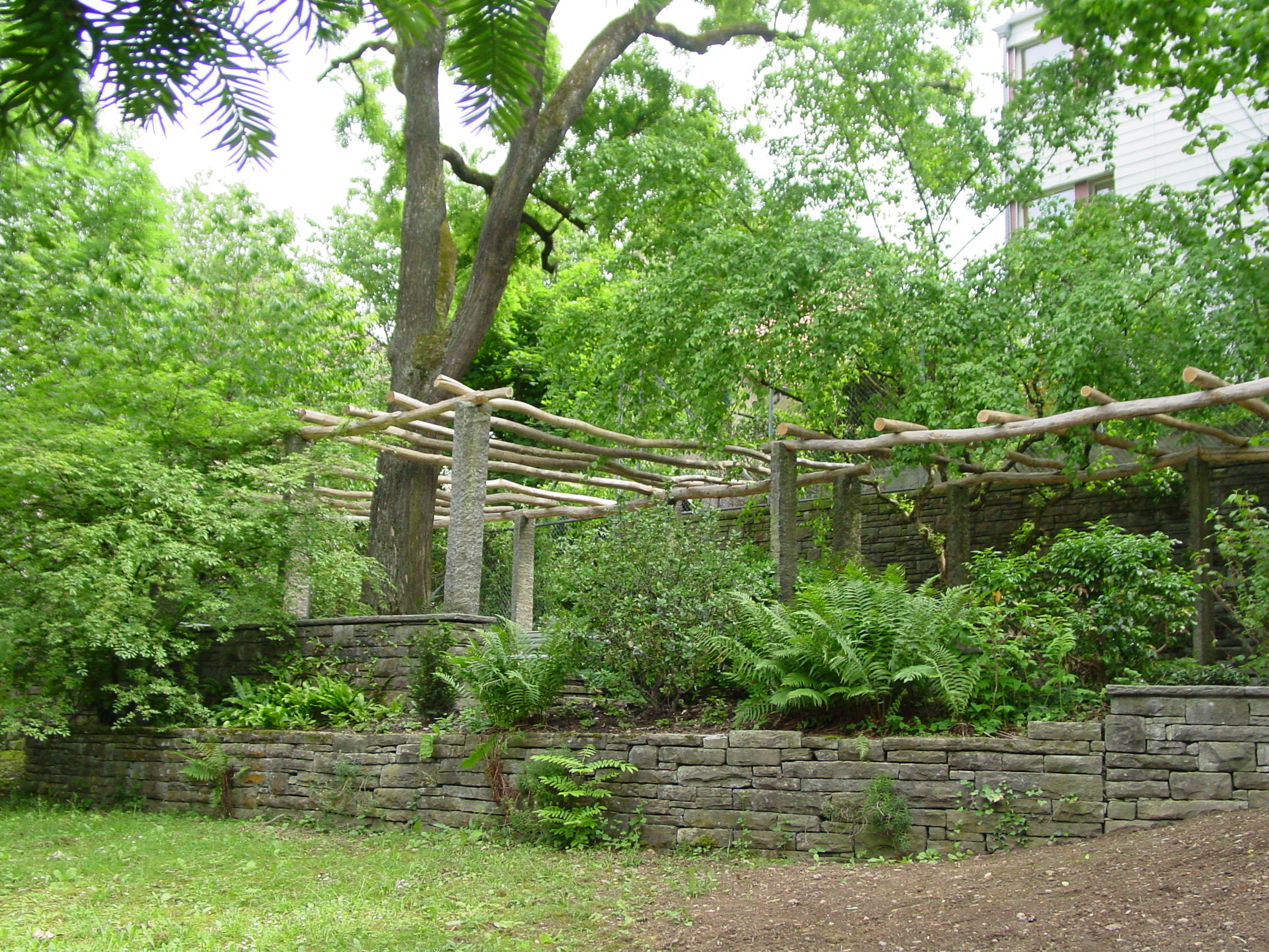 Pergola-Variation am oberen Ende des Gustav-Ammann-Parks.